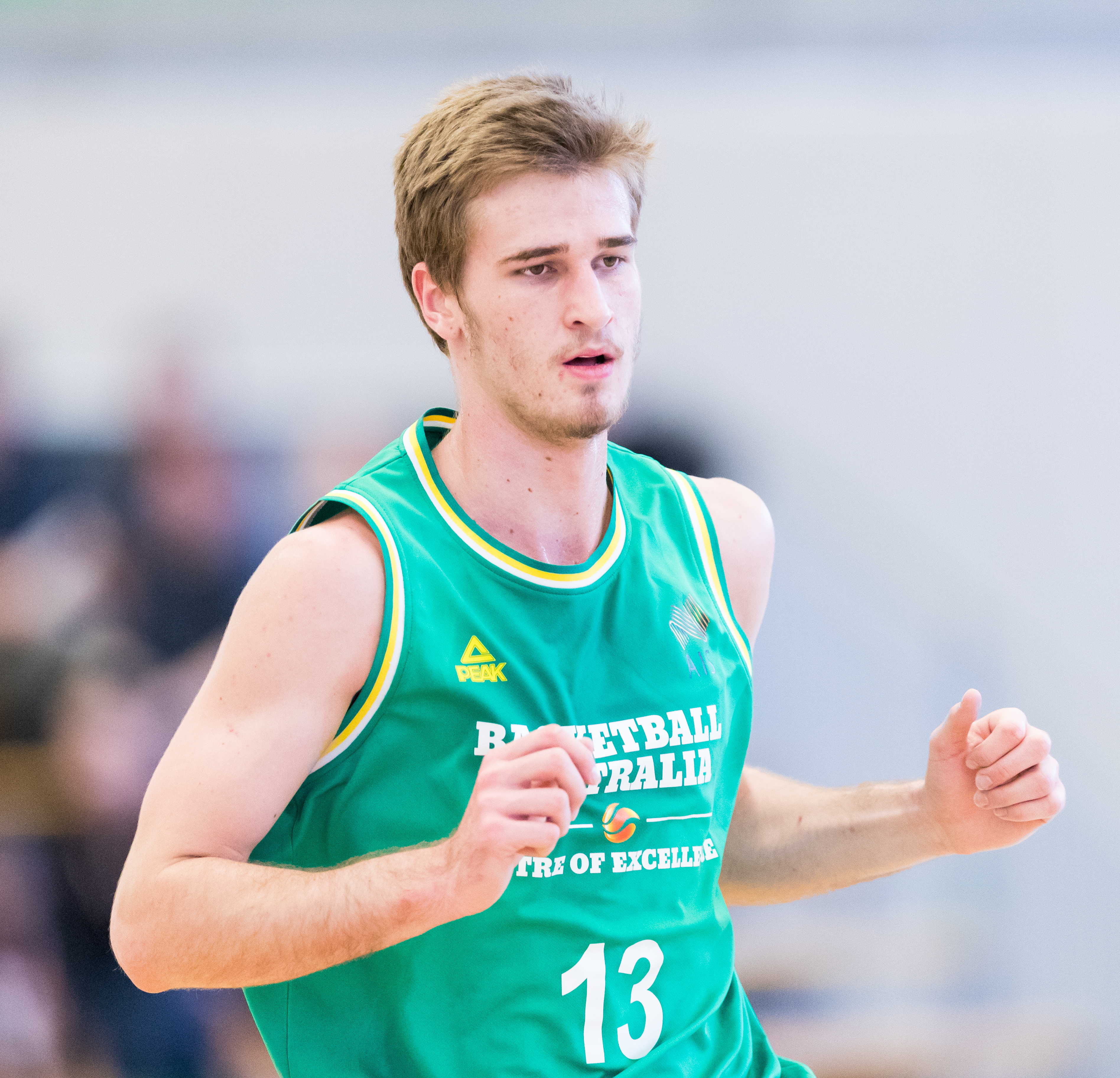 Italy vs Australia 51:84 during semi-final Basketball Albert Schweitzer Turnier at GBG Halle, Mannheim, Baden-Württemberg, Germany on 2018-04-06, Photo: Sven Mandel